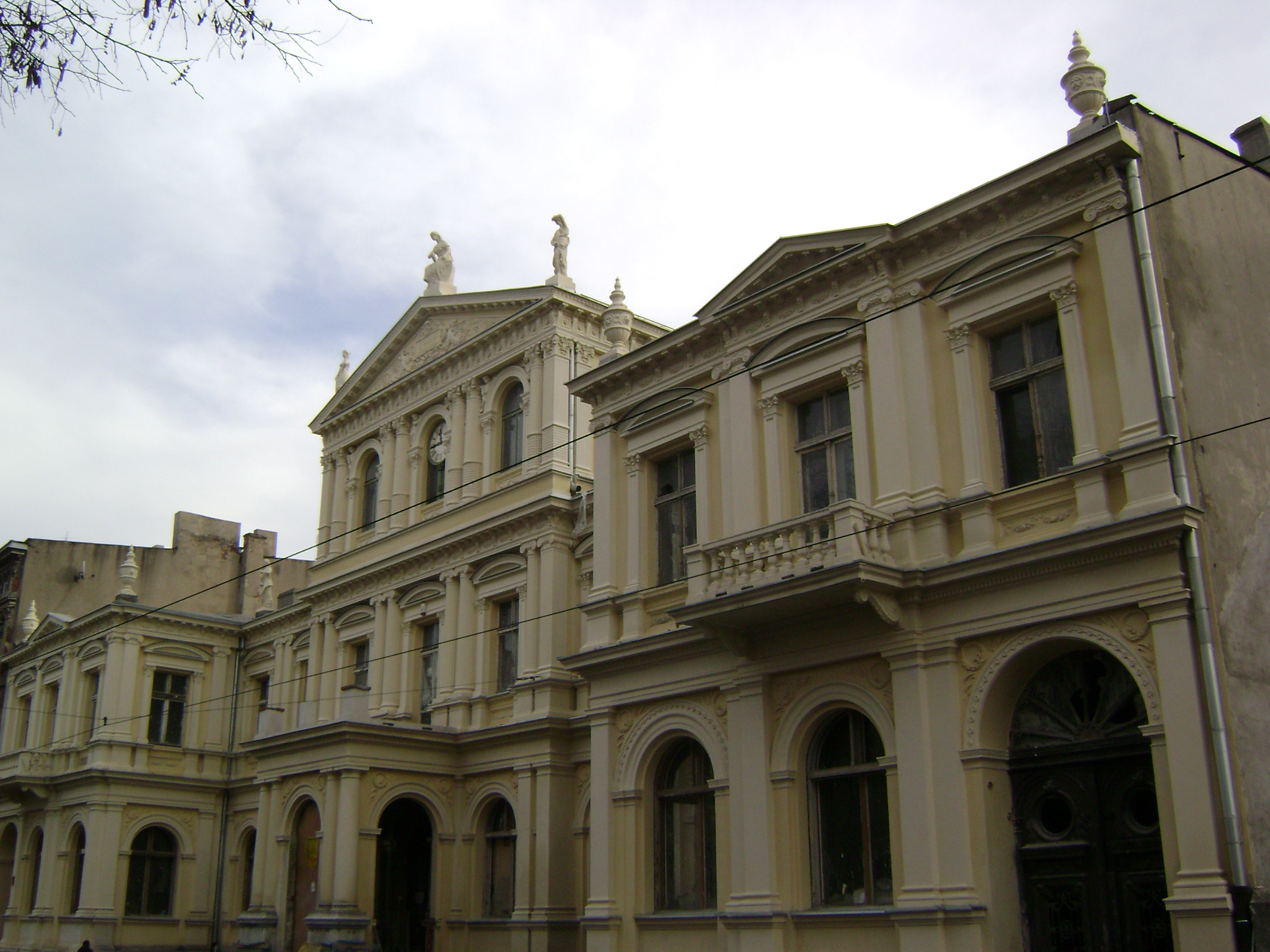 Towarzystwo Kredytowe Miejskie w Łodzi podczas kończącego się remontu